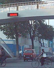 Fotografía de semáforo de Tiajin